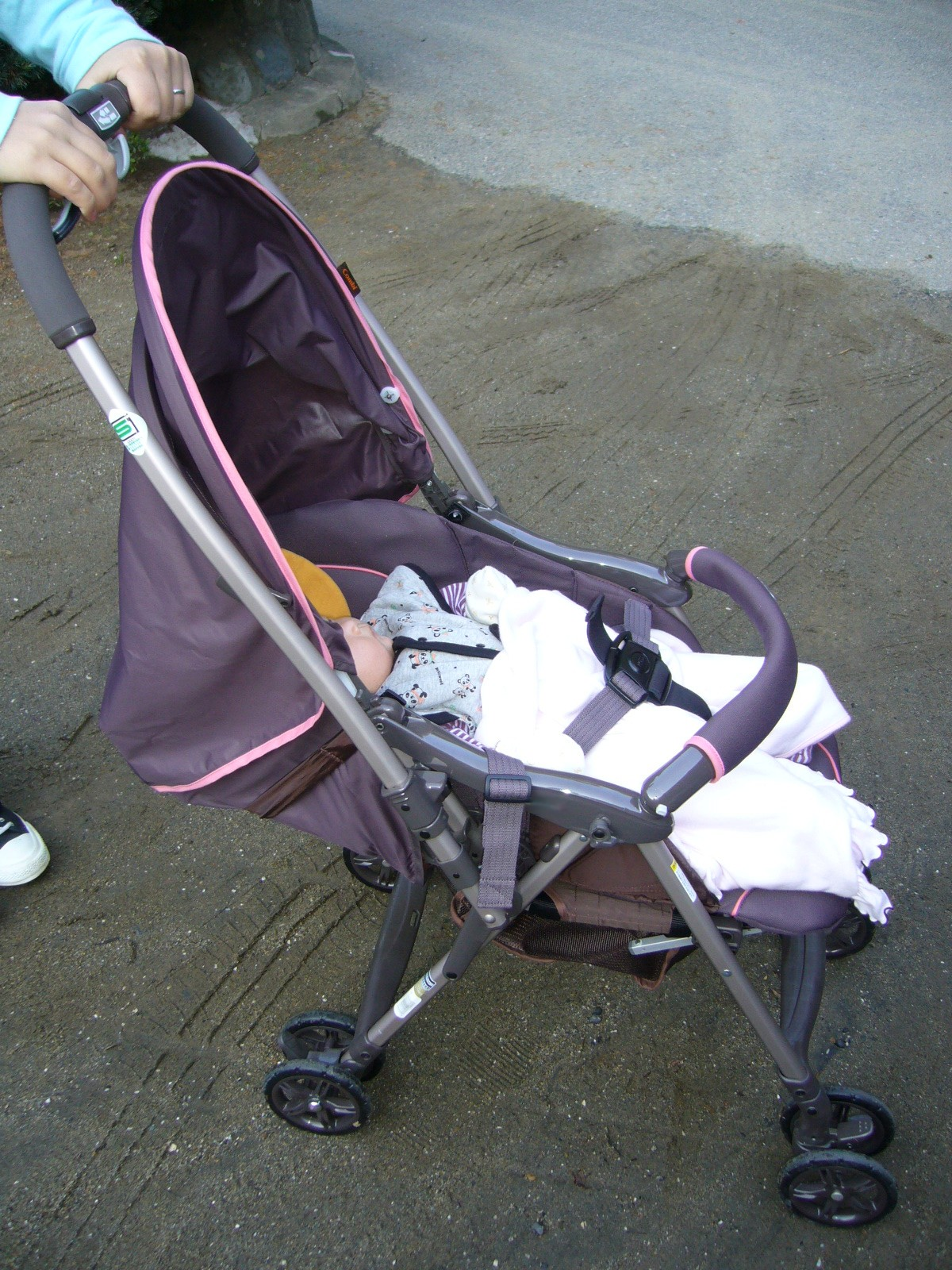 stroller & baby,baby-car & akacyan,japan